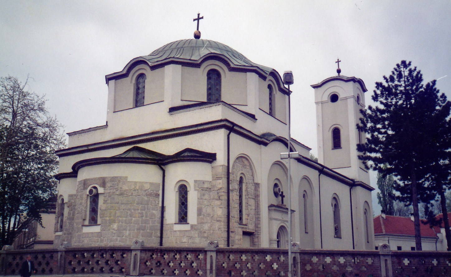 Црква се налази у самом центру Чачка. Ктитор је кнез Страцимир, брат великог Жупана Стефана Немање. Храм је грађен од 1180. до 1190. године. Основа црква је правоугаона, дужине 29,75 м. По архитектури, то је веома простран храм са троделним олтарским простором на источној страни, са звоницима и високом средишњом куполом чији је распон скоро 12 метара. Турци су цркву делимично рушили и од ње правили исламску богомољу, но Срби су је упорно обнављали. Прва обнова извршена је 1834. године, а друга знатно обимнија, 1856. године. Радикално је промењен спољашњи изглед храма. Уверење да барокни стил не одговара старој чачанској цркви, покренуло је нову рестаурацију да би јој се вратио средњевековни облик. Узорци су тражени у старим рашким храмовима. Овде су нађена стара звона закопана у земљи. На једном од њих откривен је натпис на старословенском, који каже да је звоно поклонио градачки митрополит Никифор, а на другом да је звоно дар Пресветој Богородици Градачкој из 1454. године. Звоно је једно од најстаријих у Србији. У ризници чачанске цркве налази се више старих рукописних књига. Најначајније је четворојеванђеље, познато у науци као “чачанско”. У збирци икона најначајнија је Богородица Одигитрија са Христом. То је рад непознатог сликара из XВИ века, са лепим рамом. Велика репрезентативна целина иконостаса своју декоративност дугује способном мајстору дрворесцу Николи Јанковићу. То је богатство резбарених биљних фризова са сребрним и златним фолијама. Према садашњим сазнањима, централни део храма имао је стандардну квадратну основу и традиционалну просторну структуру: уписани крст. Необична просторна унутрашњост и велике размере дозвољавају да се пореди само са највелелепнијим црквама тог доба.